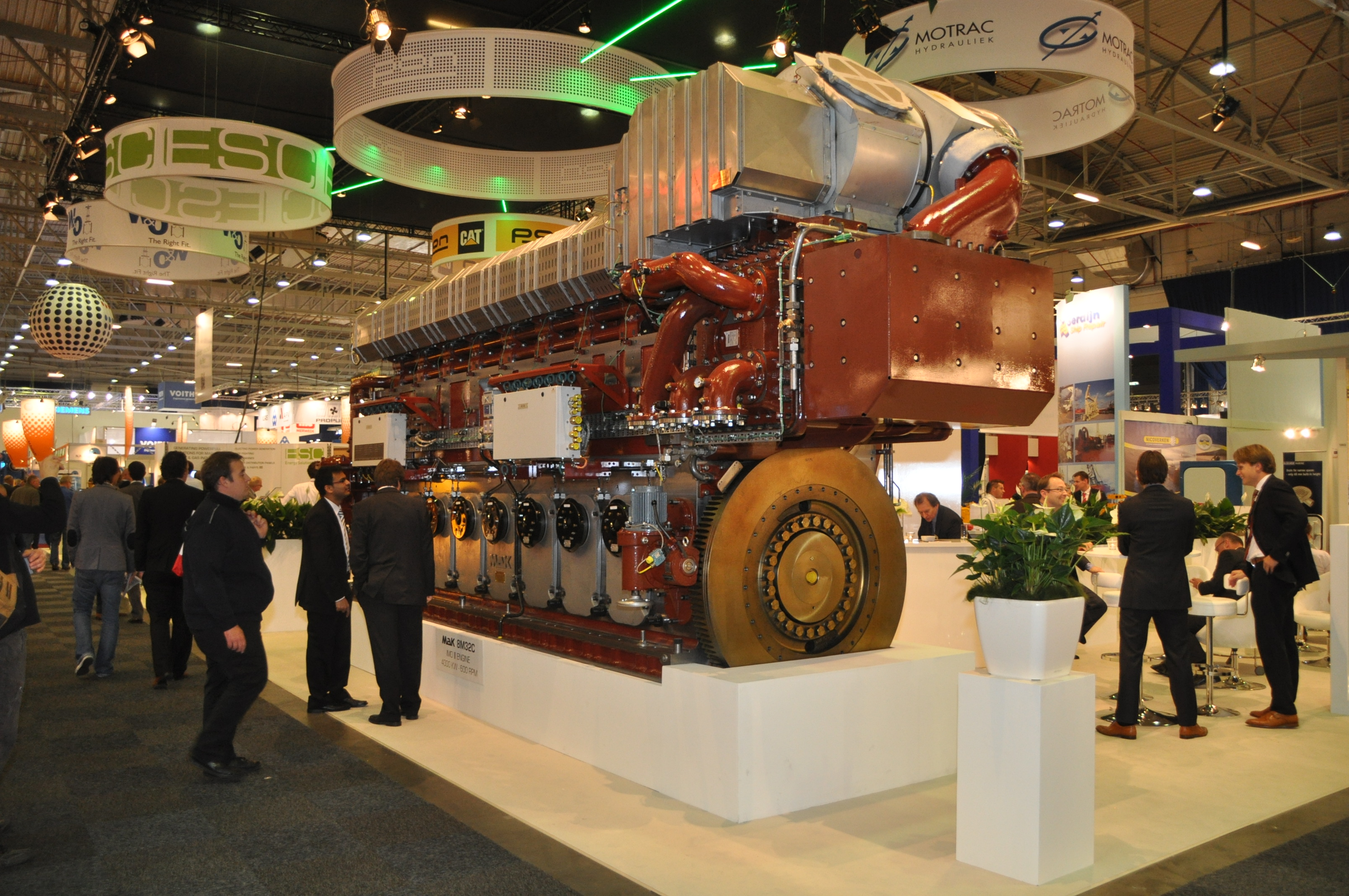 MaK marine diesel 8M32C IMO II engine 4000 KW 600 RPM